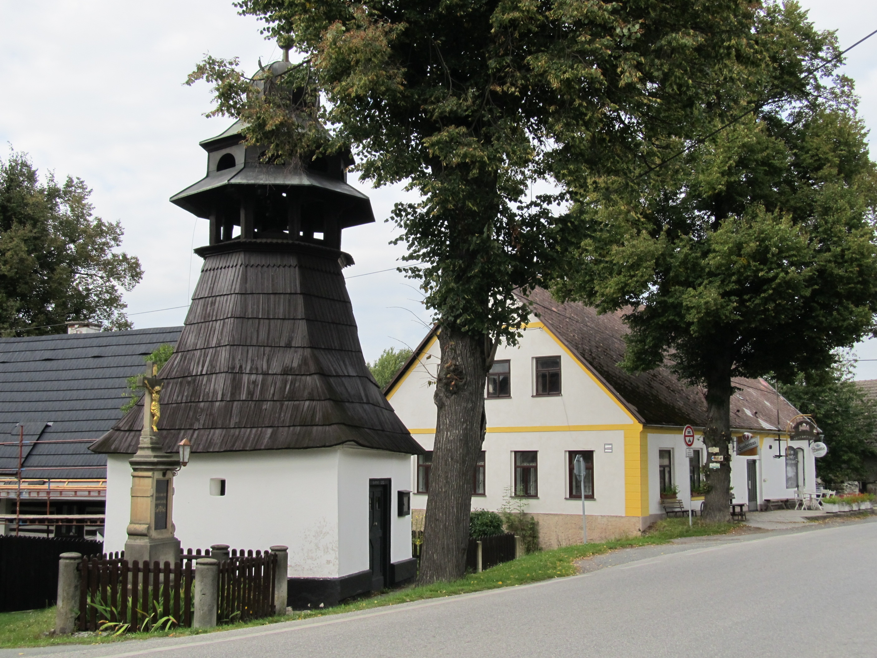 Kaplička Panny Marie se zvonicí (Červená Hora), Červená Hora